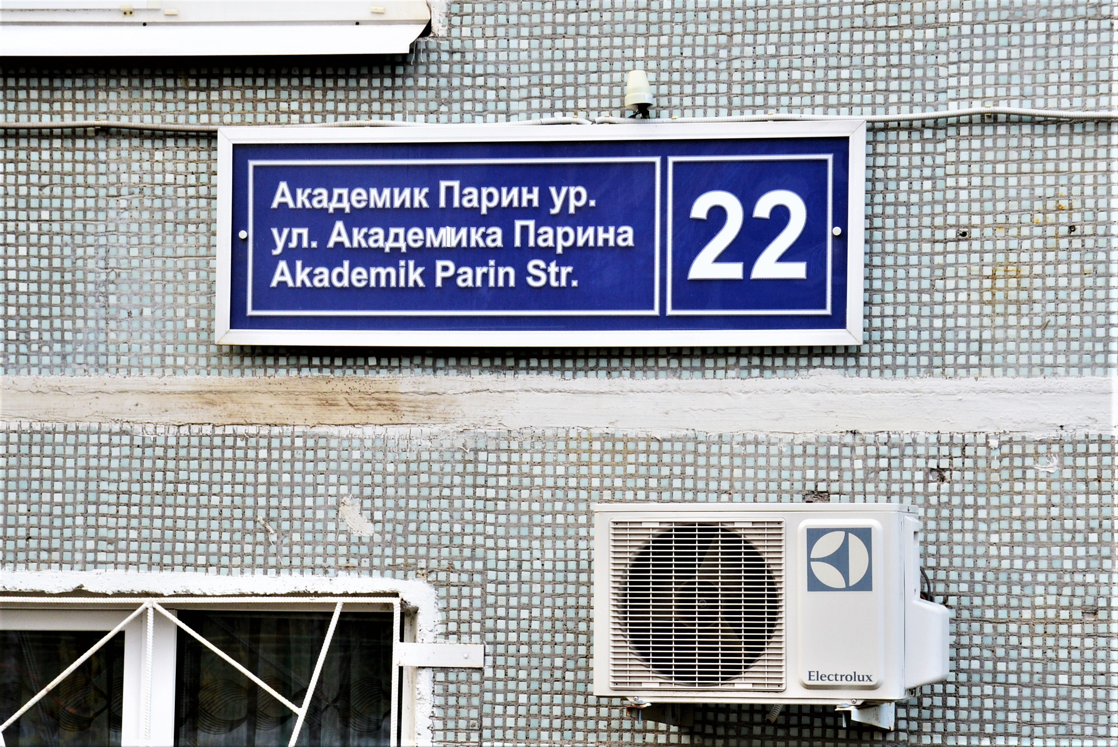 Казань. Табличка на доме: ул. Академика Парина, 22.